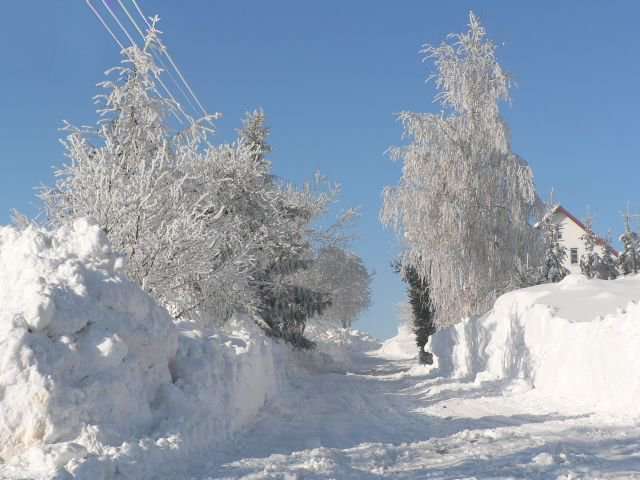 Zima v Hlubočci